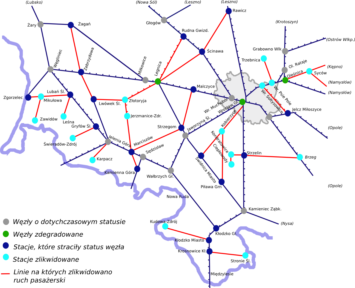 Żródło: Węzła o dotychczasowym statusie Węzła zdegradowane Stacje, które straciły status węzła Stacje zlikwidowane Linie na których zlikwidowano ruch pasażerski